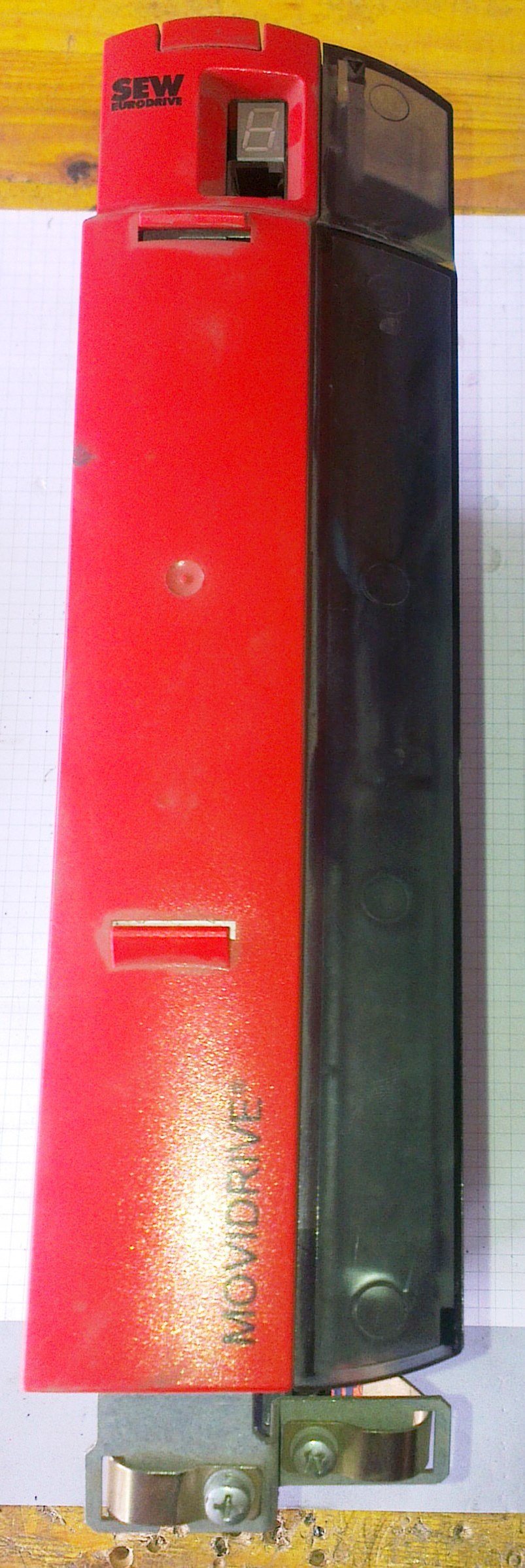 Frekvenčni pretvornik znamke SEW MUVIDRIVE.